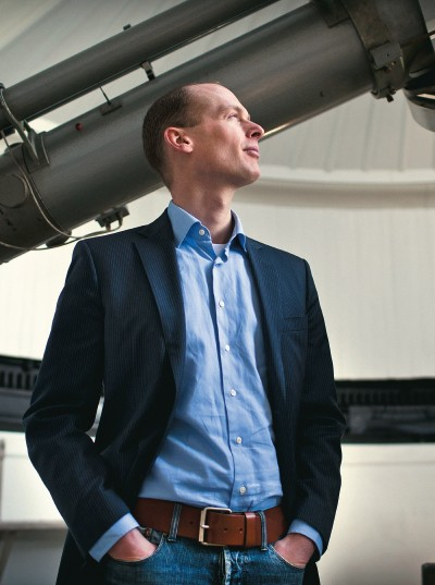 Palestrantes Magistrais e Destaques da CPBR8